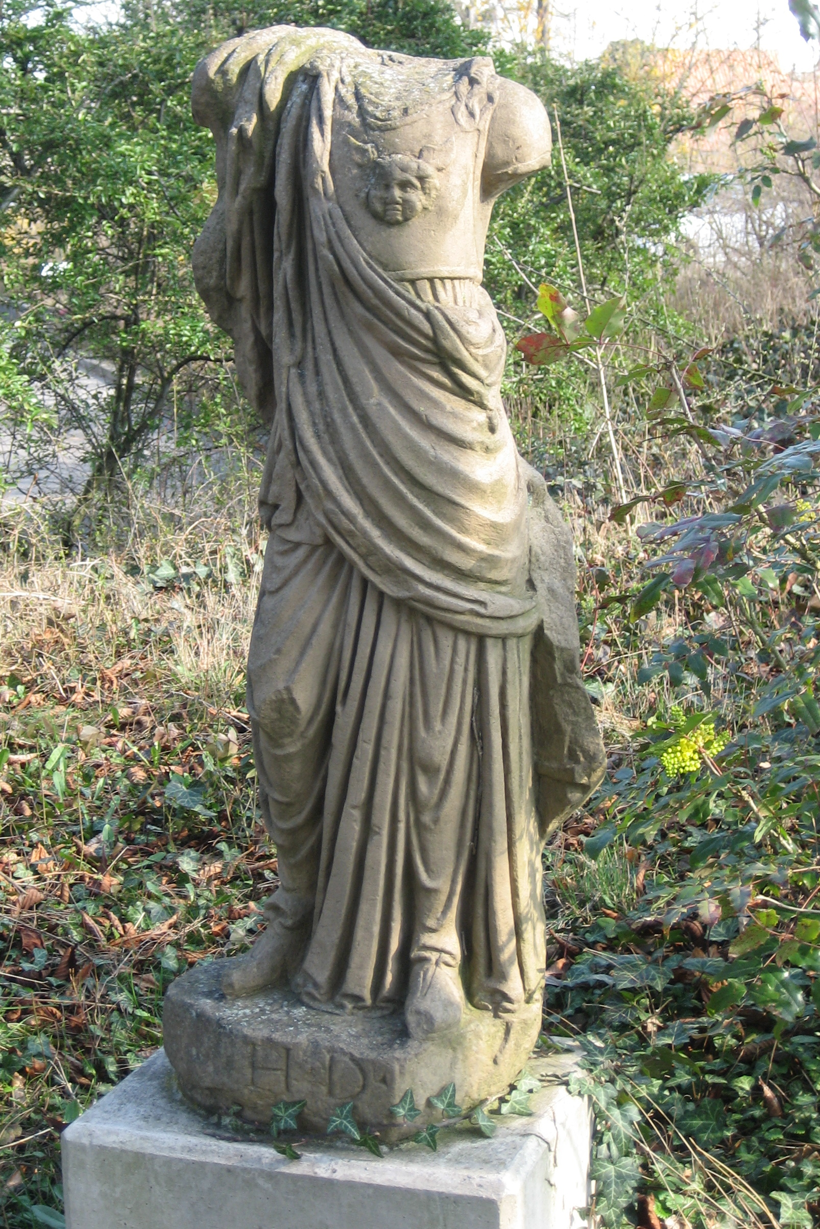 Öhringen Minerva-Statue (Kopie einer 1861 beim Eisenbahnbau gefundenen Statue), Standort: Krankenhaus Öhringen